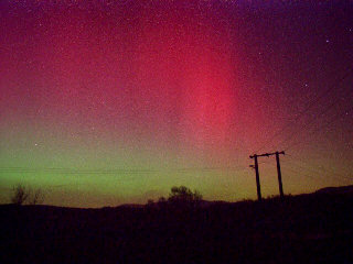 Photo aurore polaire du 20/11/2003 près de Belfort transmise par ~~ avec l'autorisation de l'auteur : Auteur : Raymond MERCIER, F5JAE (90300 Valdoie - France) Date : 20/11/2003 à 19h15 Appareil numérique Olympus C4000. Conditions : f/2,8 - pose de 16 secondes - ISO400 - focale 32mm Lieu : La Chapelle-sous-Chaux, près de Belfort (90) - France. Copyright : licence GFDL